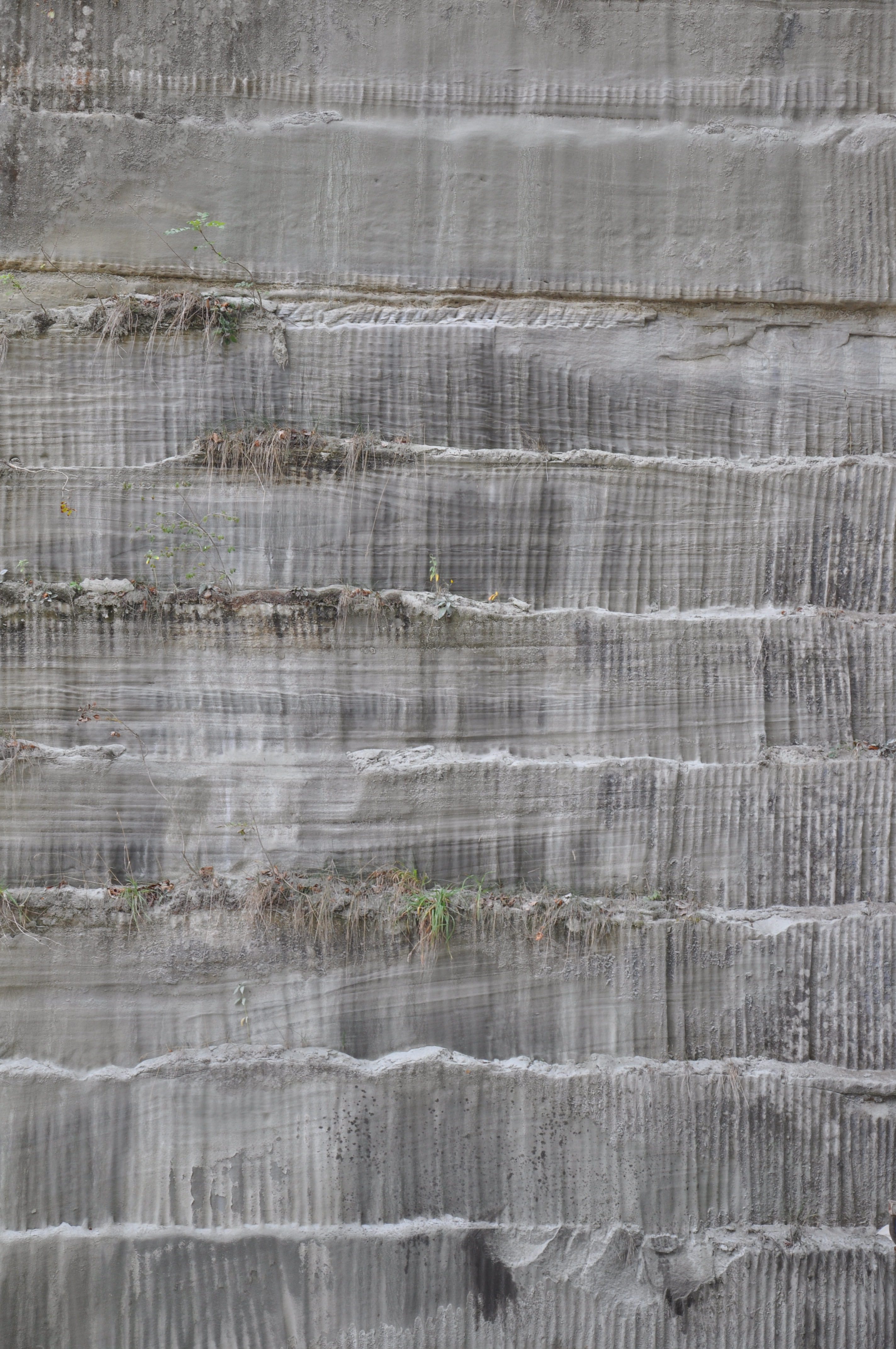 Exploitation ancienne d'un front de taille au marteau pneumatique